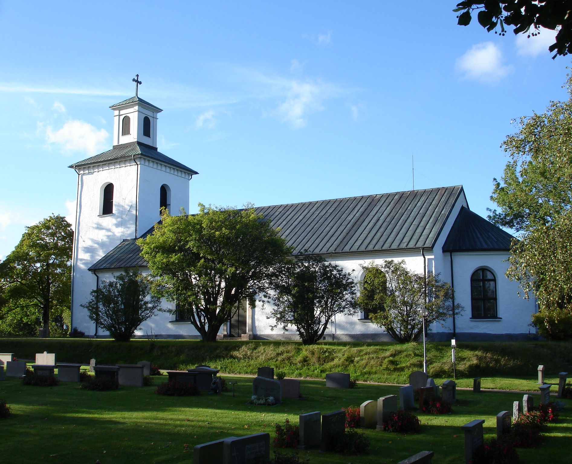 Annerstad kyrka september 2011